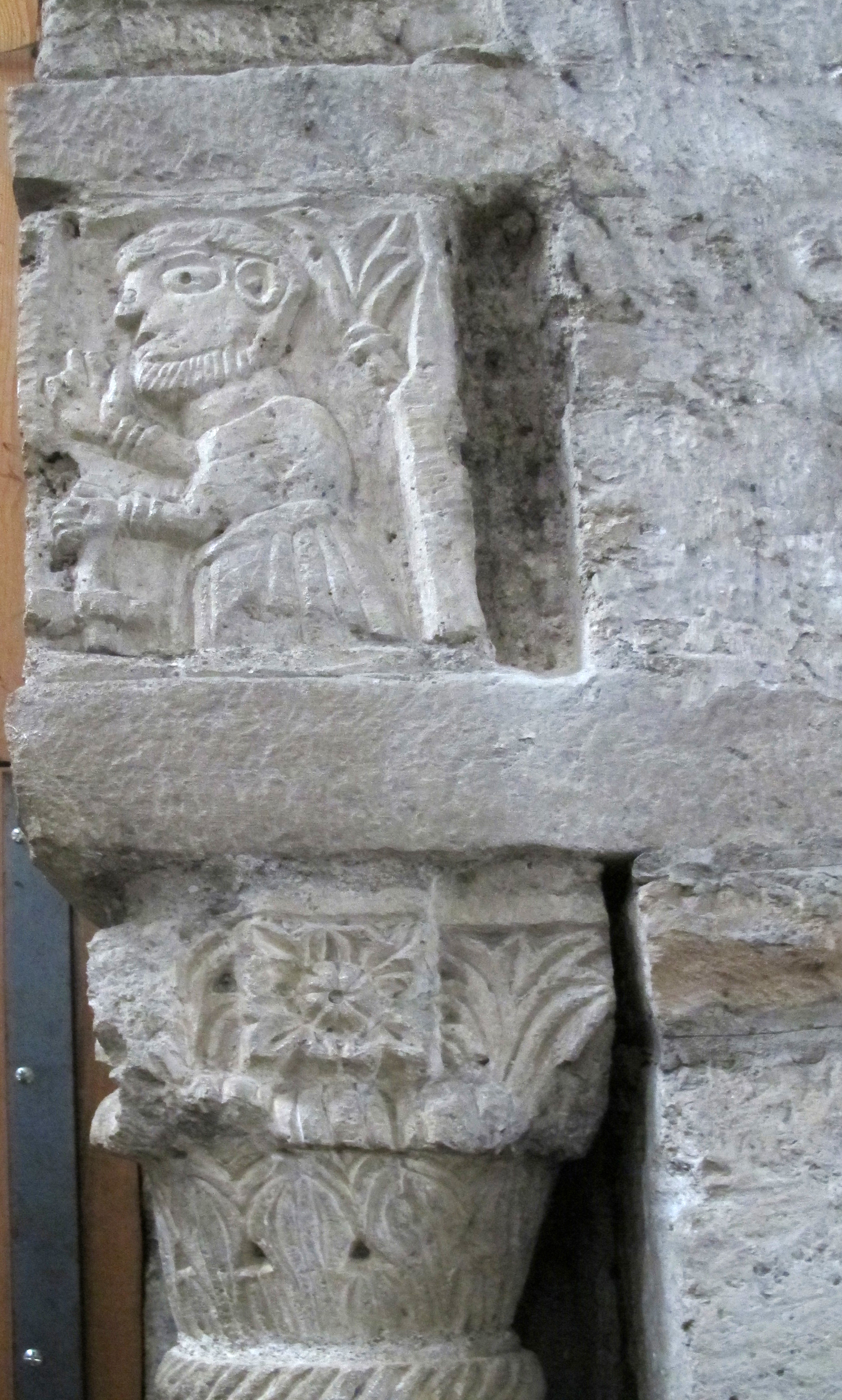 Romaans kapiteel